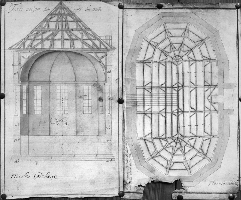 Walenkerk: Bestektekening: dwarsdoorsnede en kapplan